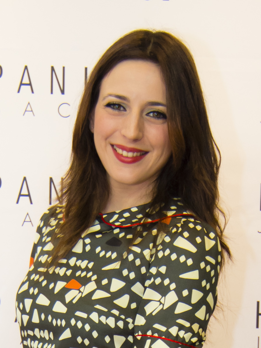 HispanitasLovesMadrid